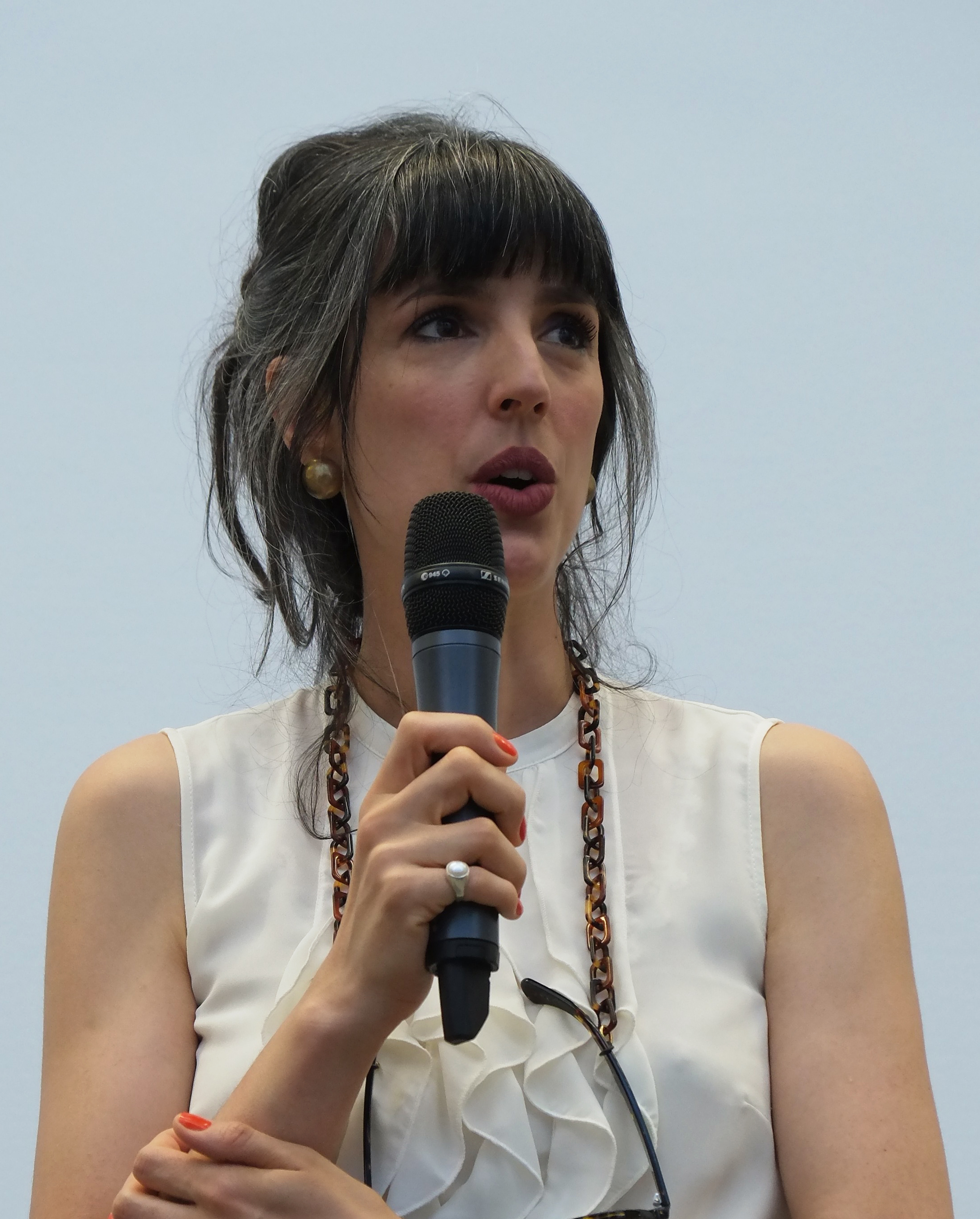 Anna Duque y González de Durana, Eröffnungsansprache Donata Wenders, FO.KU.S Foto Kunst Stadtforum, Innsbruck, 2017